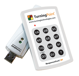 RF receiver